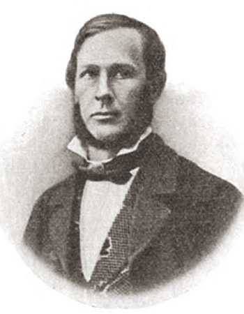 Photo - Der österreichischer Zahnarzt und Standespolitiker Moriz Heider